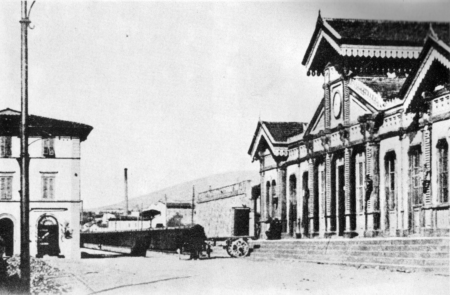 Vecchia stazione di campo di marte in una cartolina ante 1908